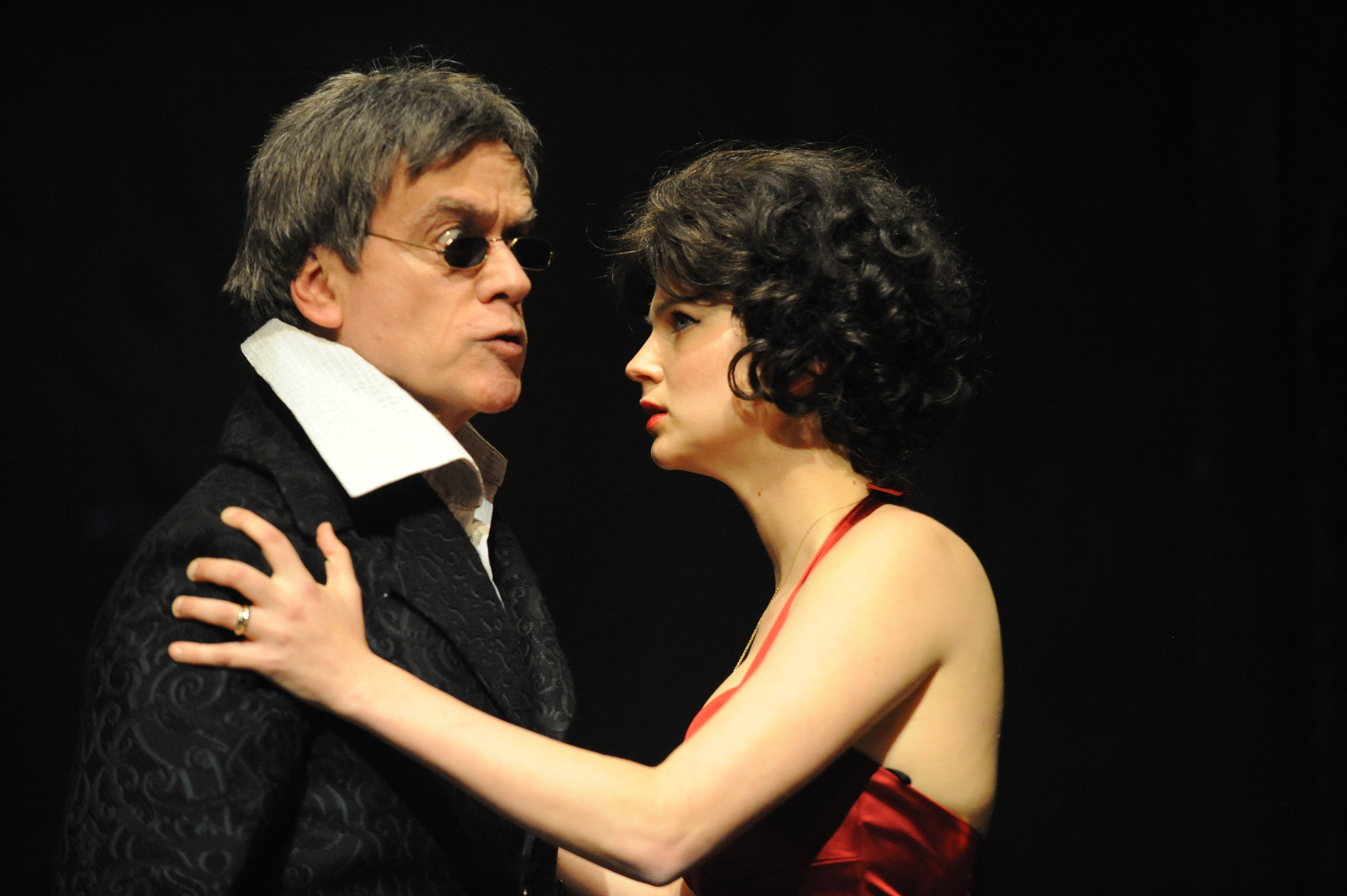 שמרית לוסטיג ויהויכין פרידלנד ב"אהובת הדרקון", מאת ובבימויו של מיקי גורביץ', תיאטרון החאן